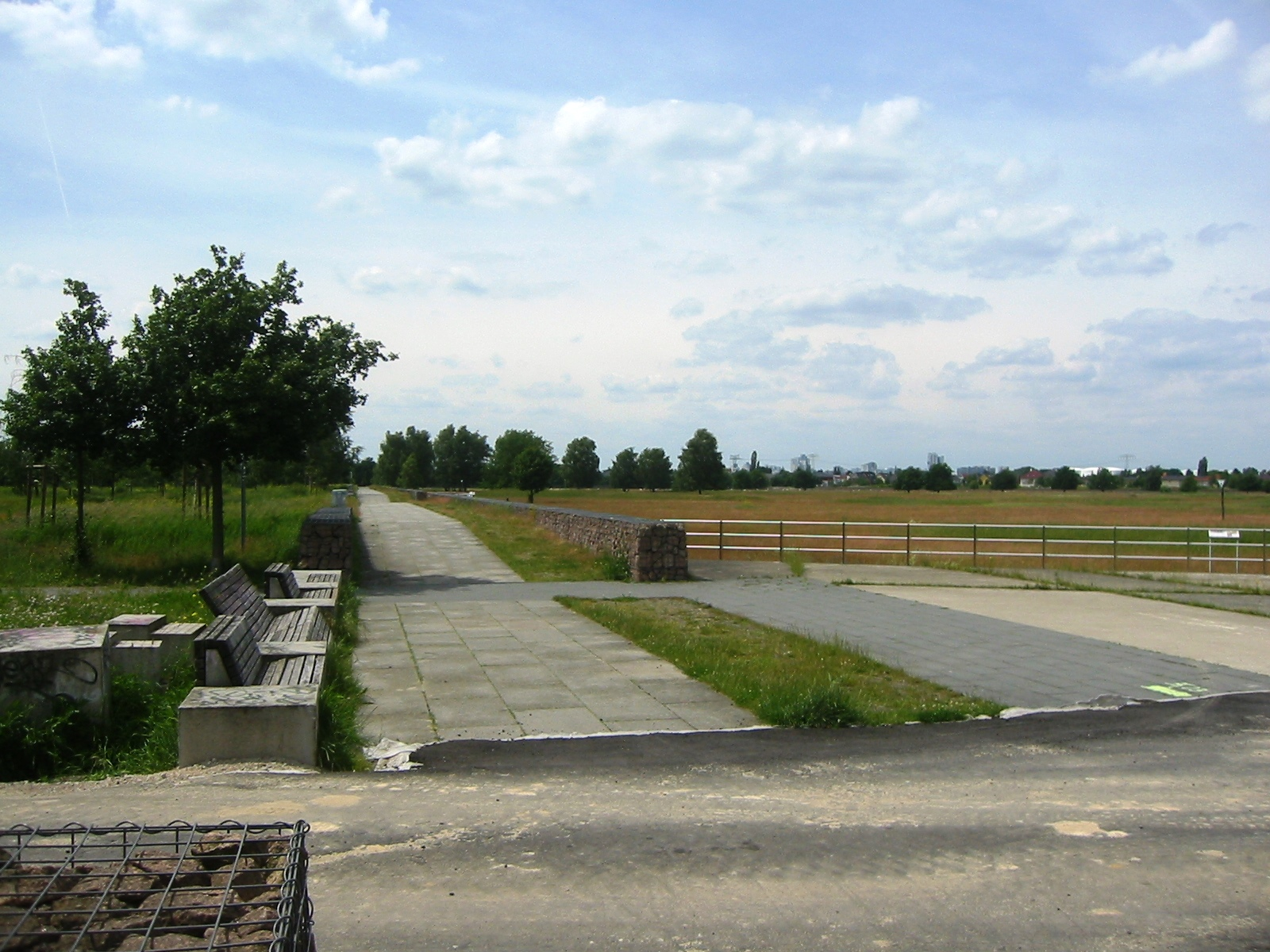 Mit Gabionen eingefasster Rundweg im Landschaftspark Johannisthal/Adlershof (ehemaliges Flugfeld) in Berlin-Johannisthal, Grenze zwischen Landschaftsschutzgebiet (links) und Naturschutzgebiet (rechts)